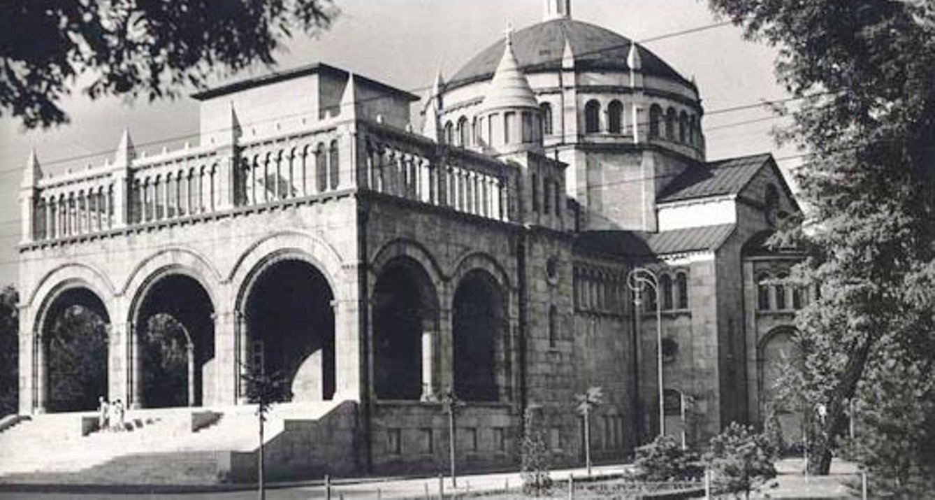 A Regnum Marianum templom fényképe, 1930 körül